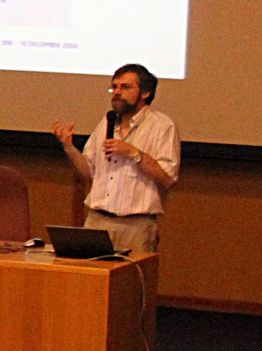 Conferencia "Reconstruyendo la evolución cognitiva" impartida por el Dr. Josep Call en el Aula Magna del Campus de Guajara, ULL (San Cristóbal de La Laguna, España). Conmemoración del centenario de la apertura de la Estación de Antropoides de Tenerife. (Fotografía: Héctor García Suárez)